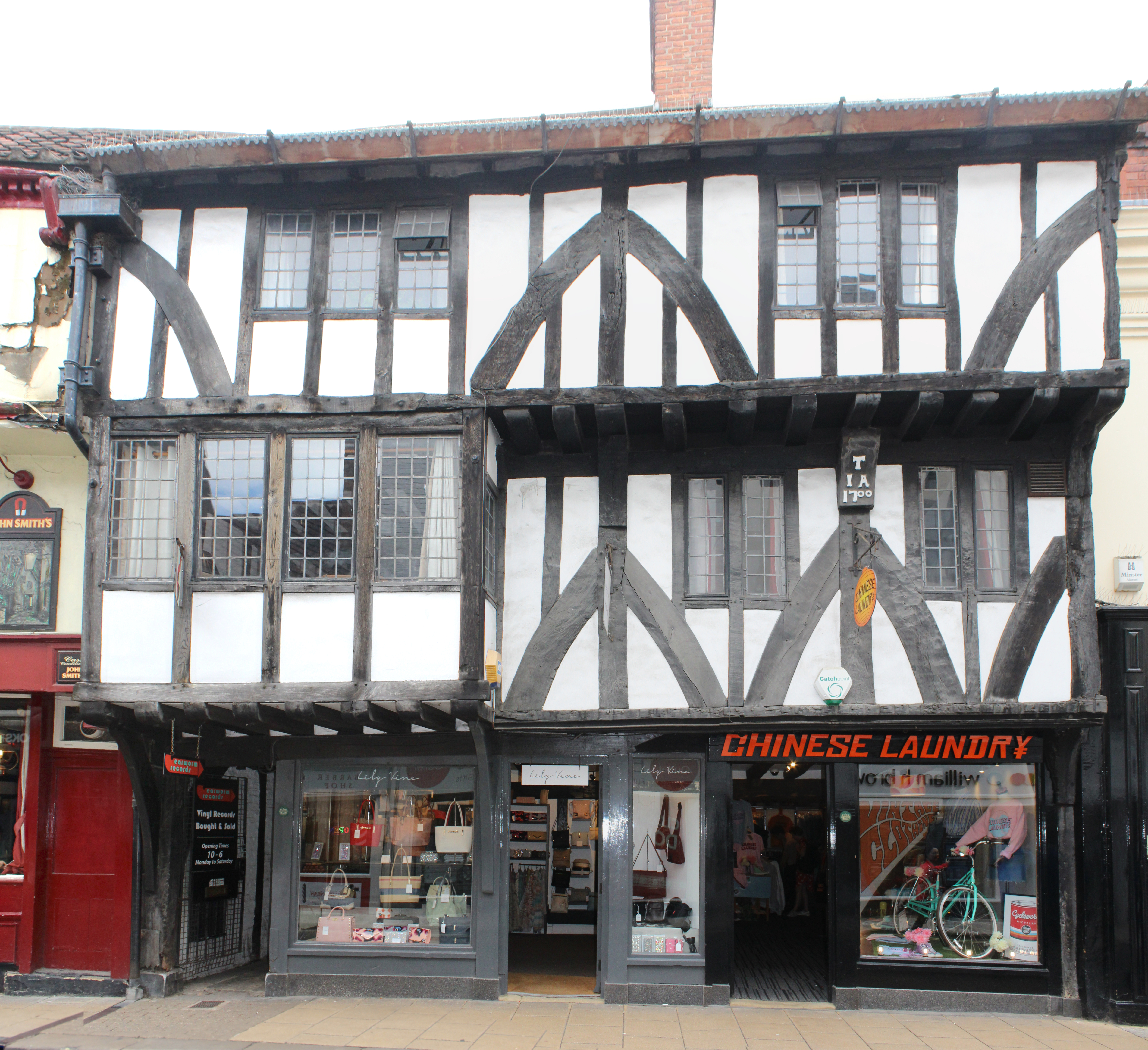 The Wealden Hall, York.